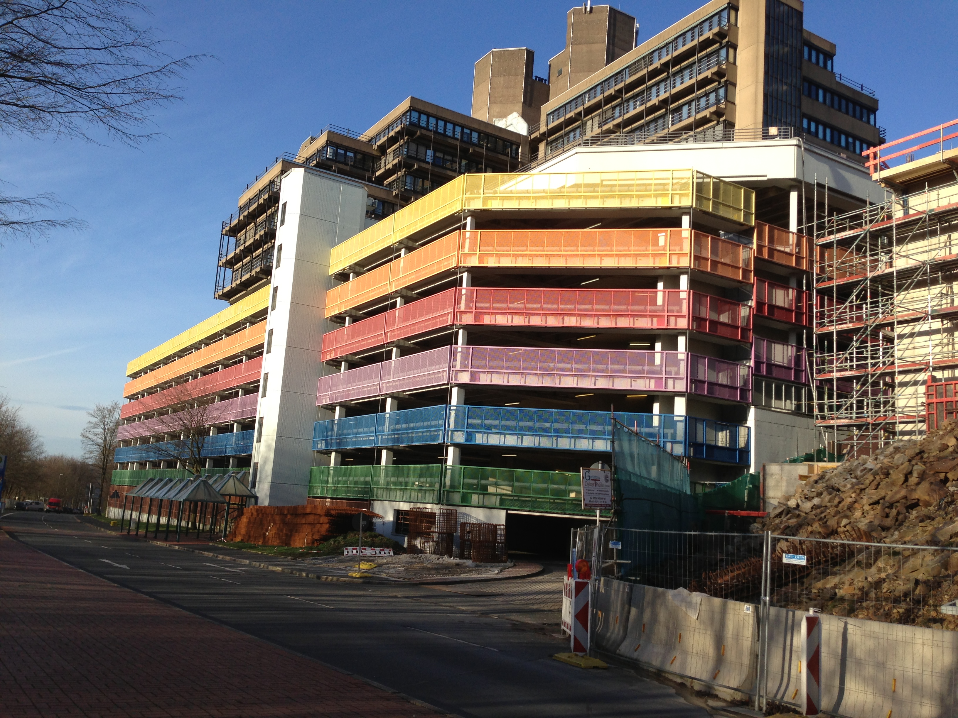 Eines der Parkhäuser auf dem Hauptcampus der Bergischen Universität